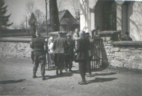 Zdjecie wykonane przed starym kosciołem.